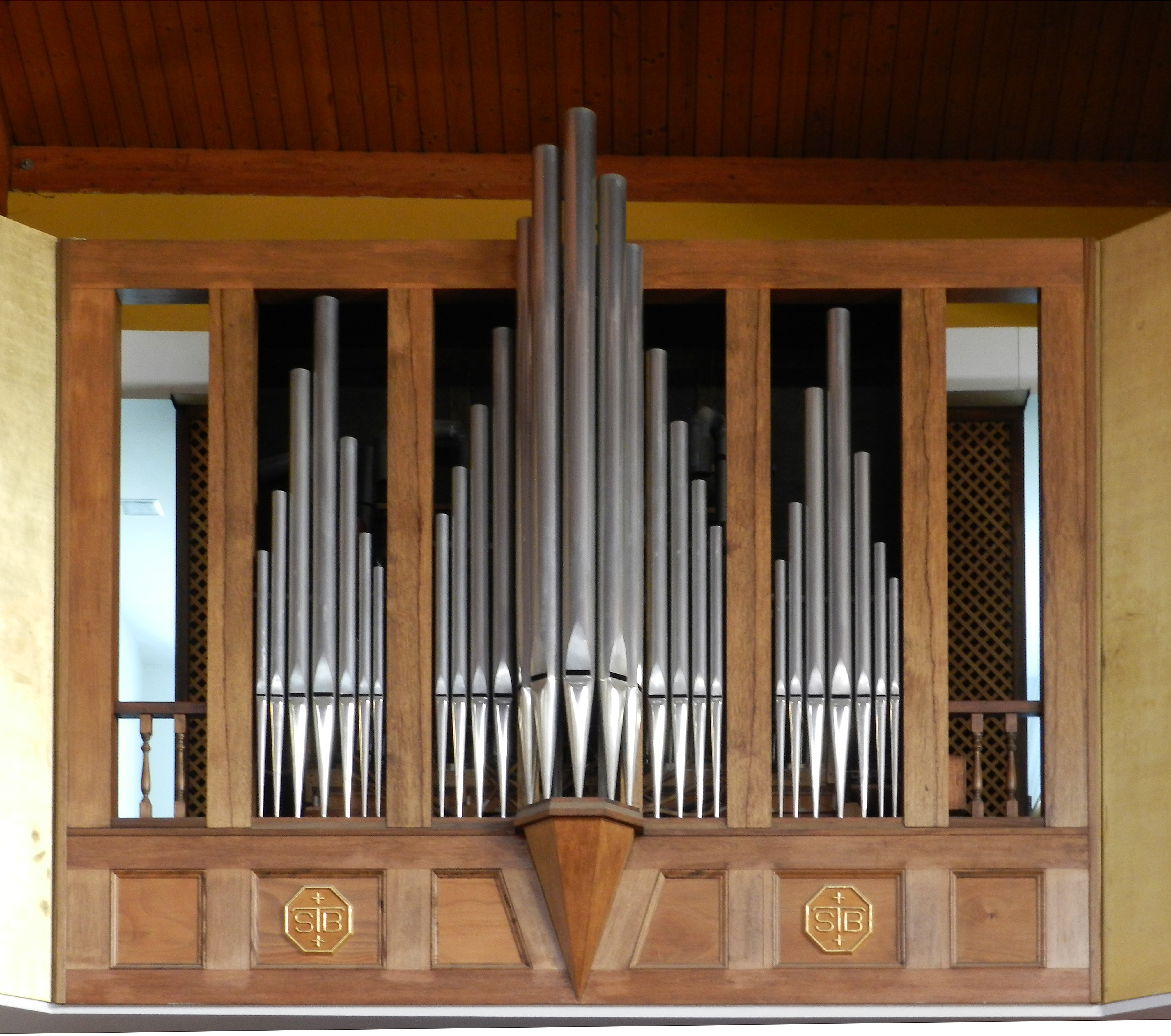 L'organo Chichi.